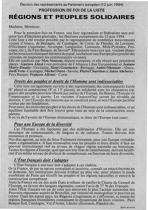 Profession de foi de la liste Régions et Peuples Solidaires conduite par Max Simeoni en 1994